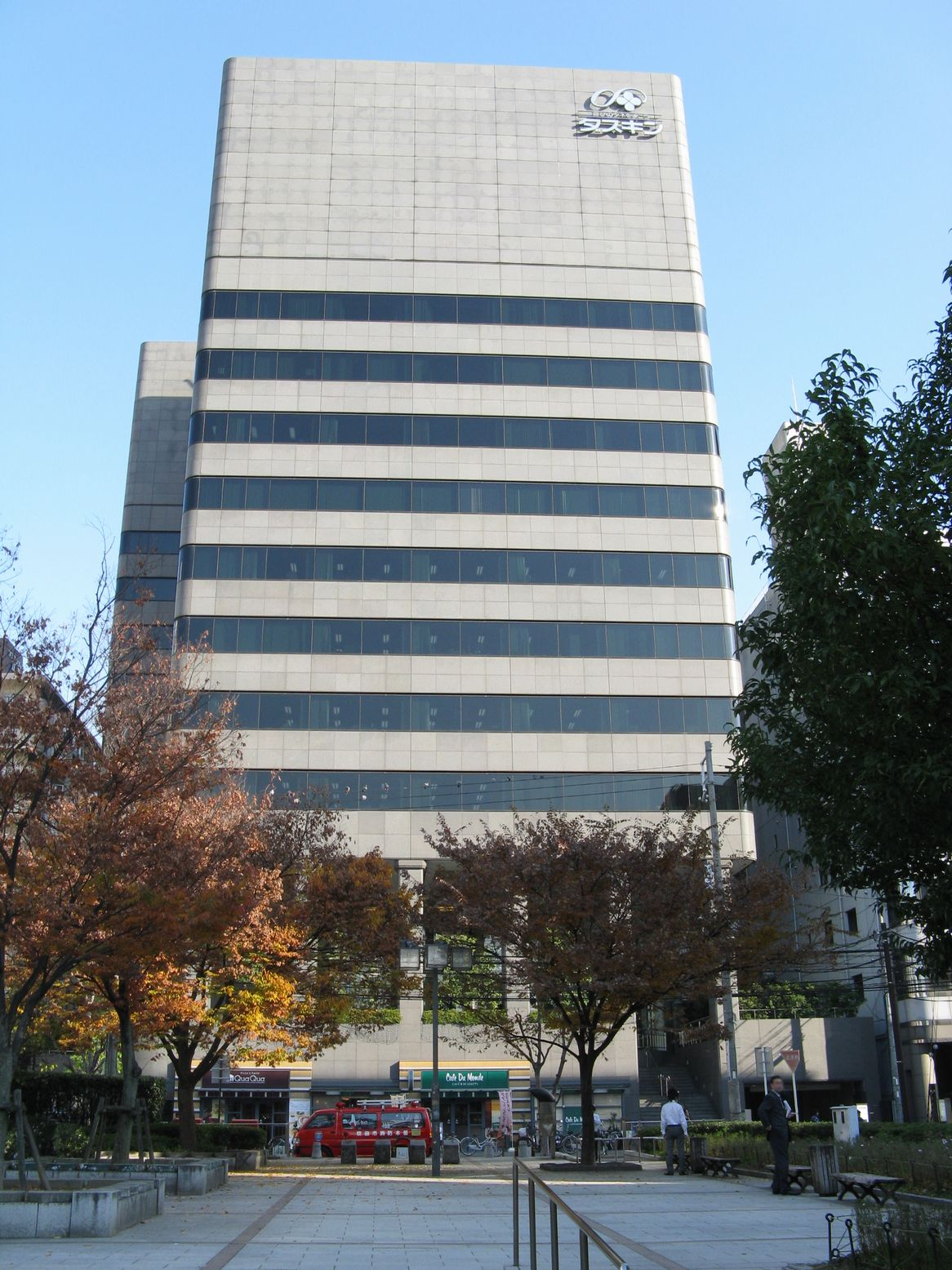 株式会社ja:ダスキン 本社